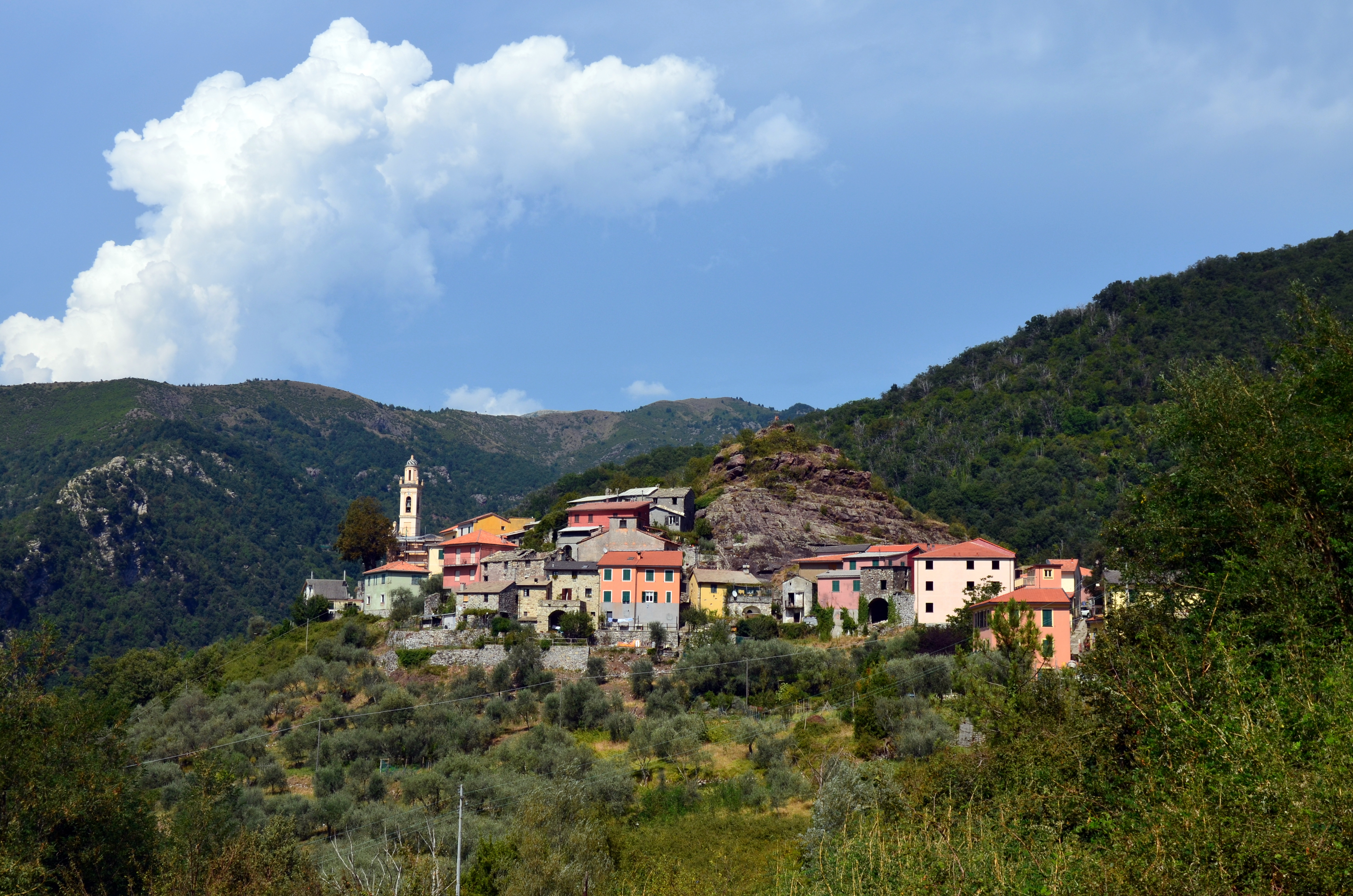 Panorama di Nascio, Ne, Liguria, Italia